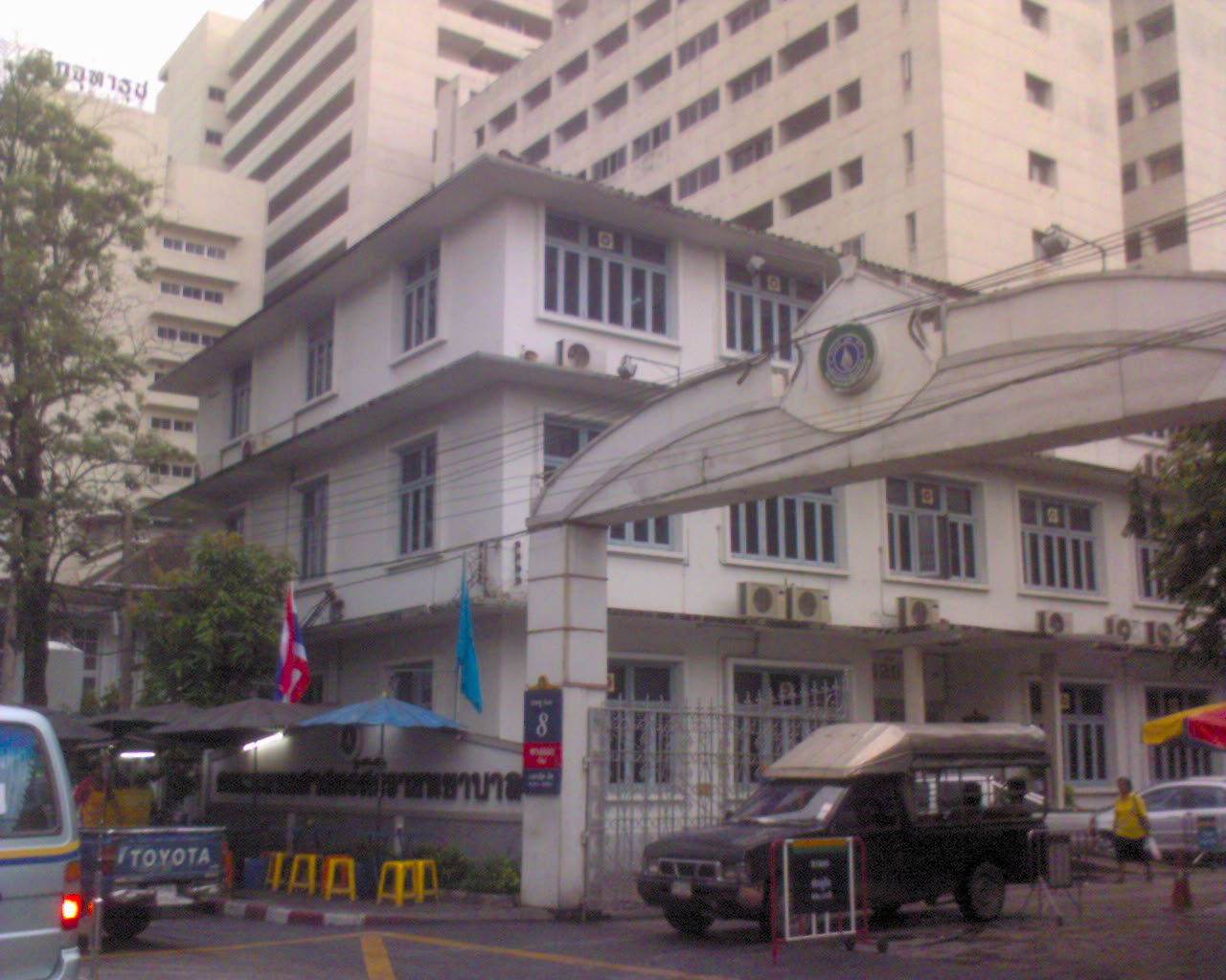 Siriraj Hospital ,Bangkok, Thailand